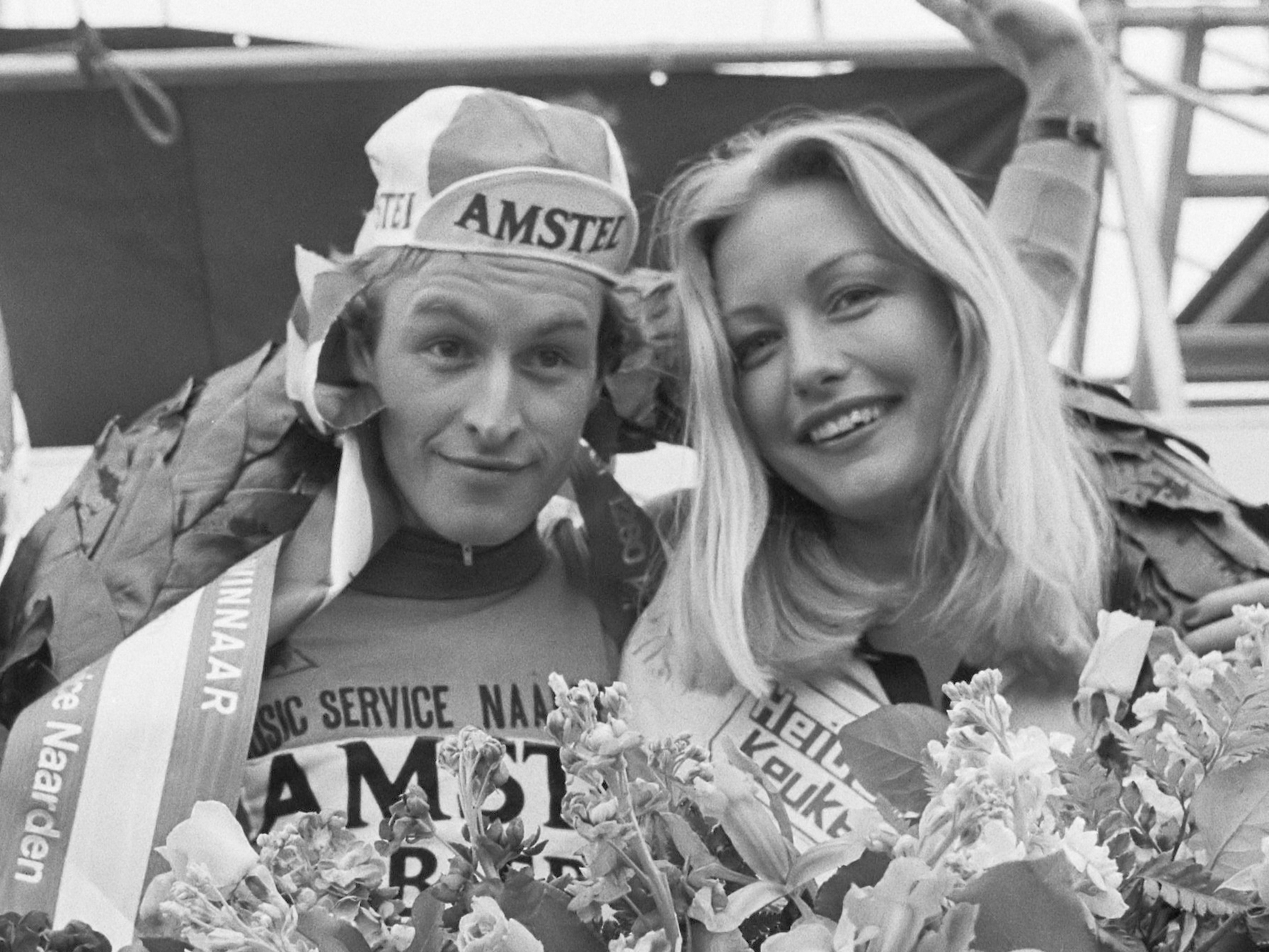 Finish Olympia's Tour ( Amsterdam Noord ), winnaar Arie Hassink in de bloemen 25 mei 1978